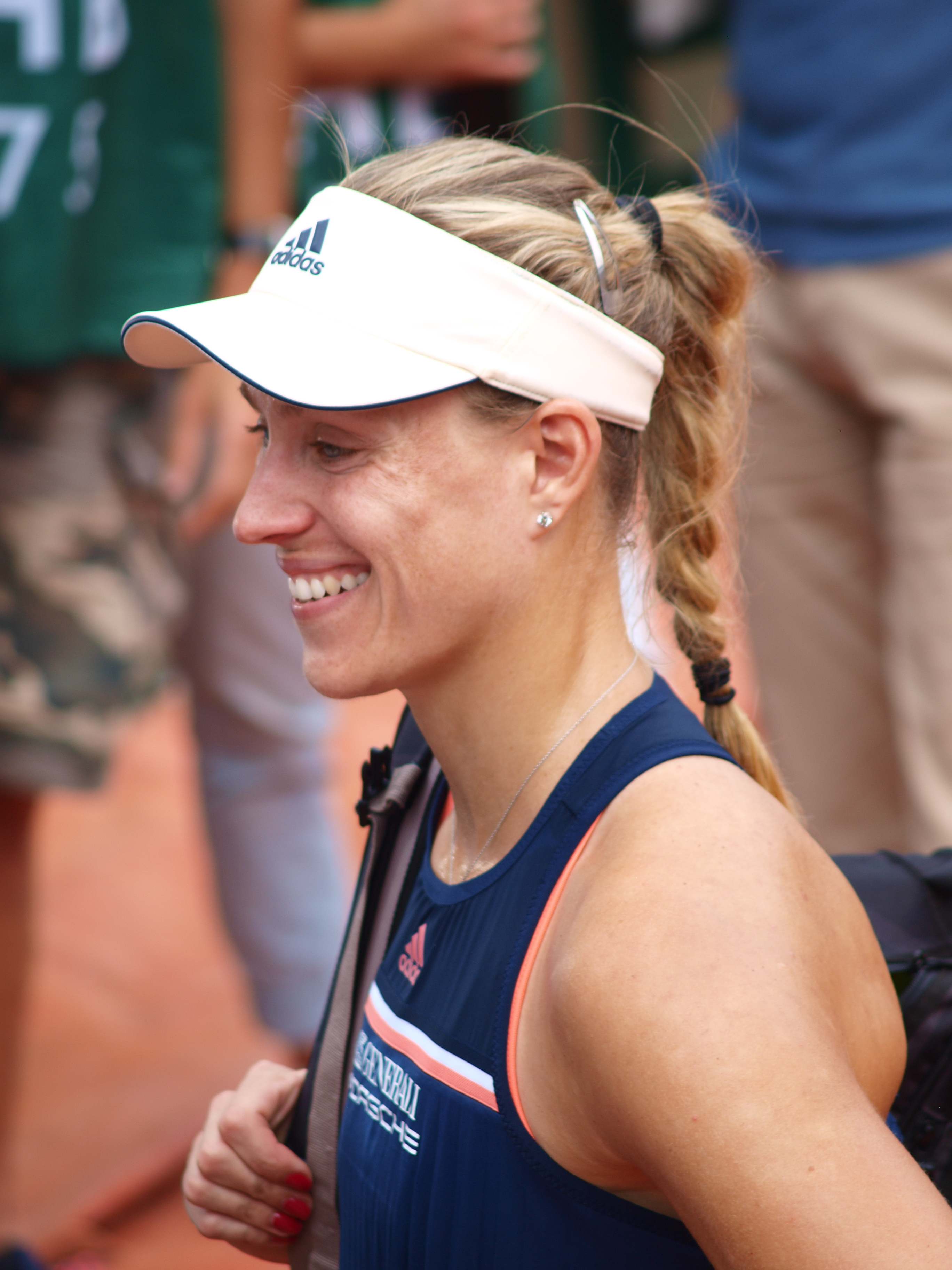 Angelique Kerber après son match contre Caroline Garcia, sur le cours Suzanne Lenglen (stade Roland Garros à Paris), le 4 juin 2018